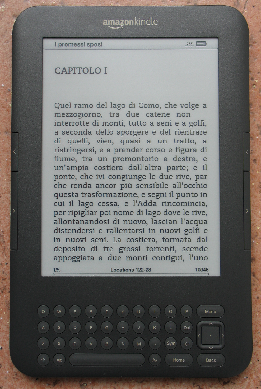 Marco Ciampa, foto del Kindle 3 da me posseduto in data 09 ottobre 2010, con Licenza (CC-BY-SA-3.0).